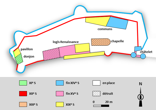 Plan chronologique sommaire du site du château de Montrésor.